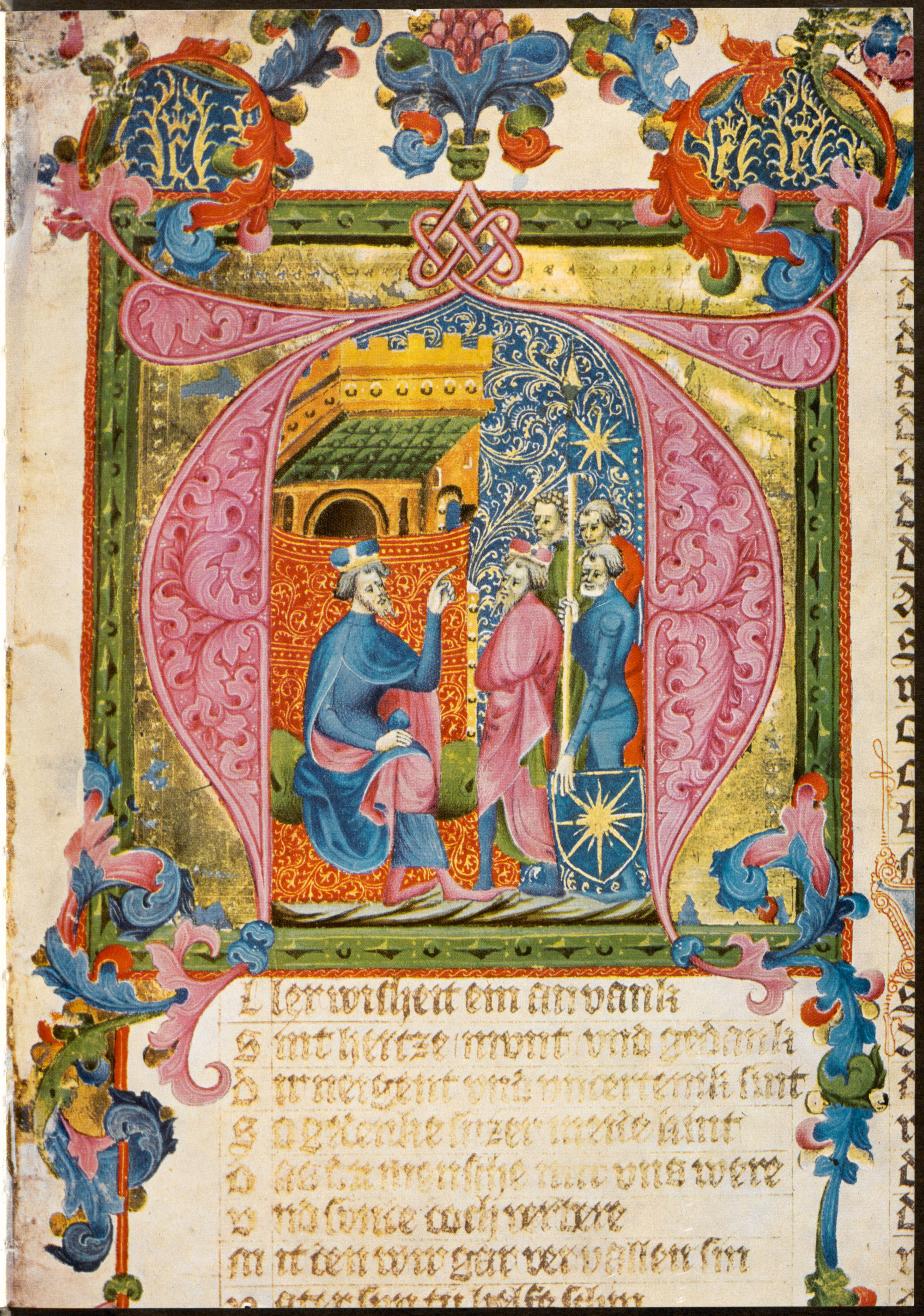 Wien, Österr. Nationalbibl., Cod. Ser. nova 2643, Bl. 1r Ausschnitt Anfang der Arabel Ulrichs von dem Türlin